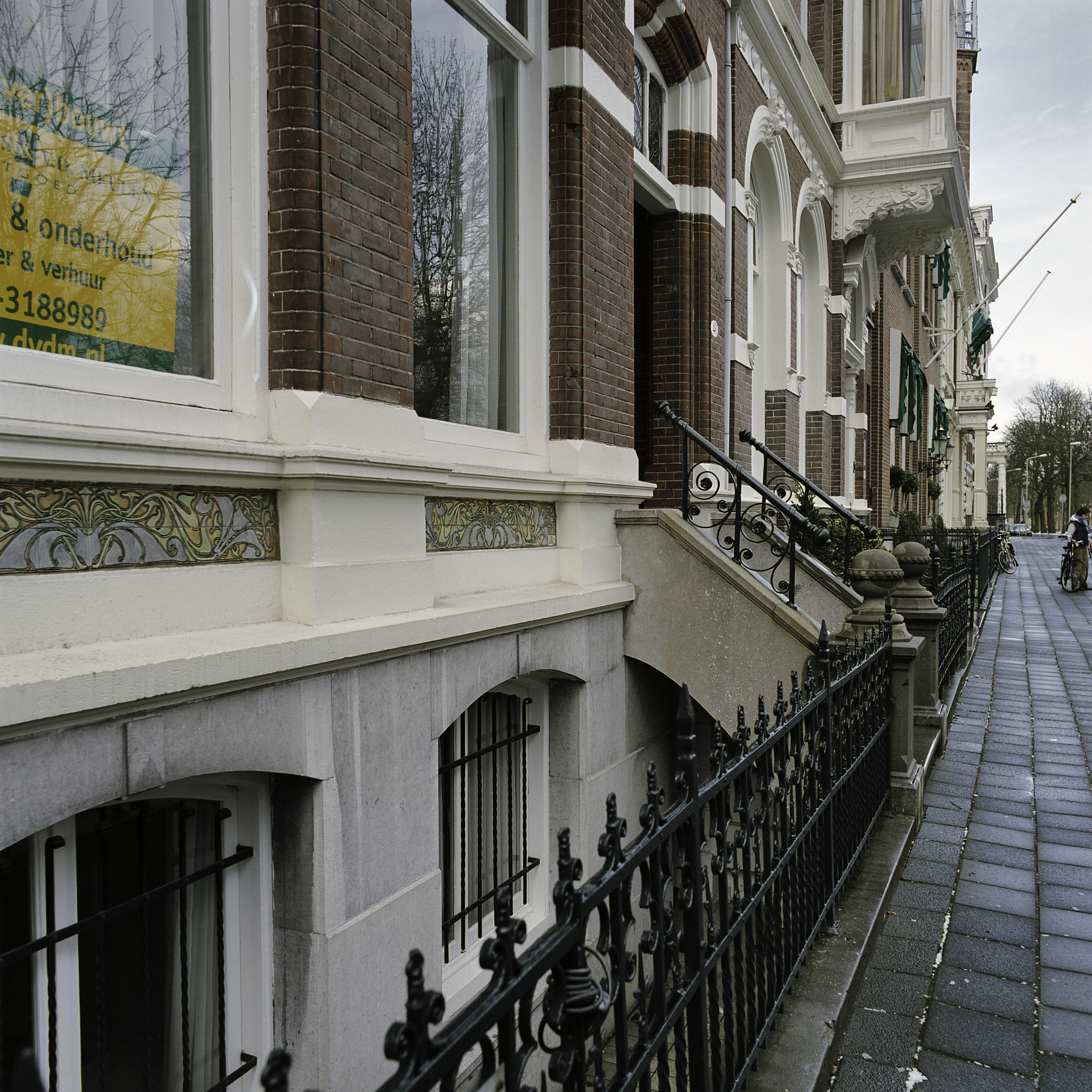 Art Nouveau/ Souterrain: Zicht op het souterrain, het smeedijzeren hek en de buitentrap naar de ingangspartij van de voorgevel